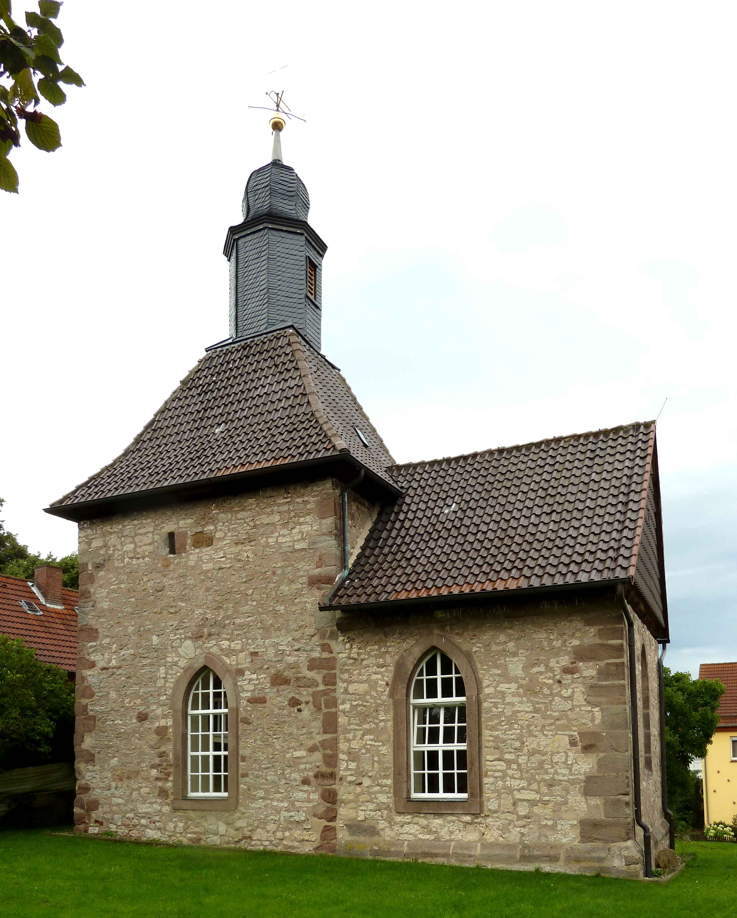 Ev.-luth. Kapelle in Wolbrechtshausen, Flecken Nörten-Hardenberg, Landkreis Northeim, Südniedersachsen. Erbaut als wehrhafte Turmkirche wahrscheinlich in der ersten Hälfte des 14. Jahrhunderts, Choranbau wenig später. Spätere Umbauten 1732. Eckquaderung aus Buntsandstein teilweise mit Wetzrillen, sonst Bruchsteinmauerwerk. Fenster und Dachreiter nicht ursprünglich.